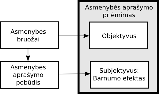 Konceptualus modelis, nurodantis sąsajas tarp Barnumo efekto ir asmenybės bruožų, atsižvelgiant į asmenybės aprašymo pobūdį.